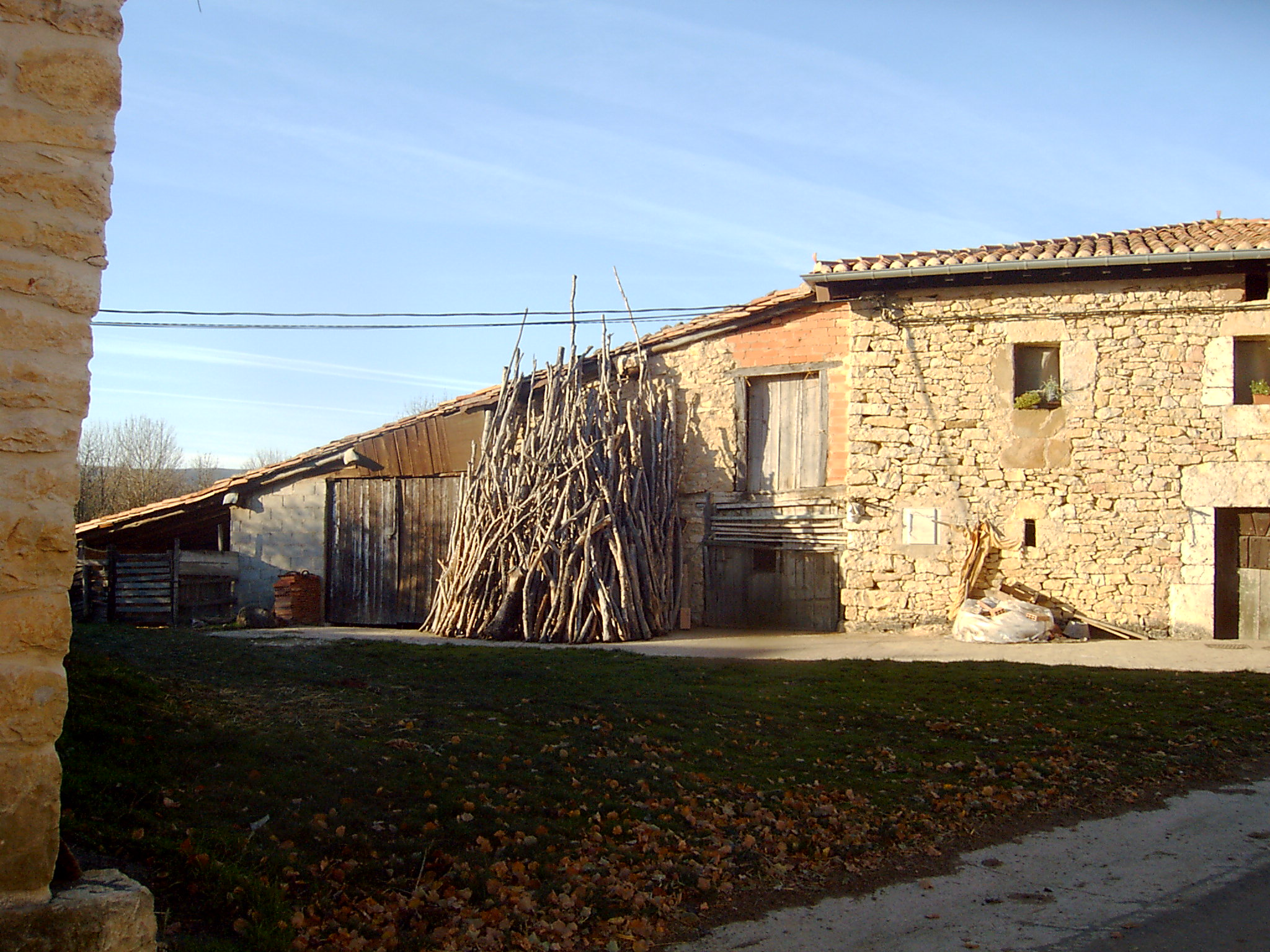 Lalastra herriko kalea